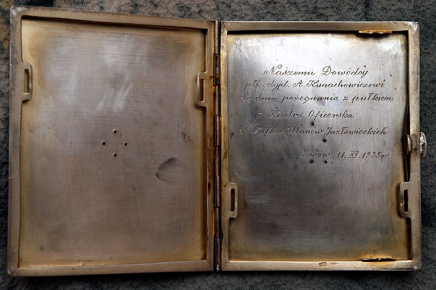 Wnętrze papierośnicy zawierające dedykację dla jednego z dowódców Pułku - płk A. Kunachowicza. 1935 rok.